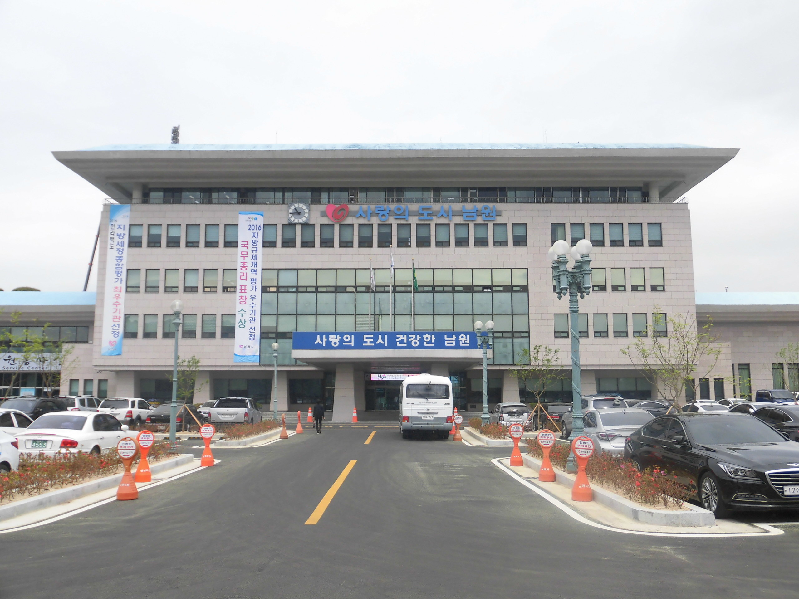 전라북도 남원시에 있는 남원시청